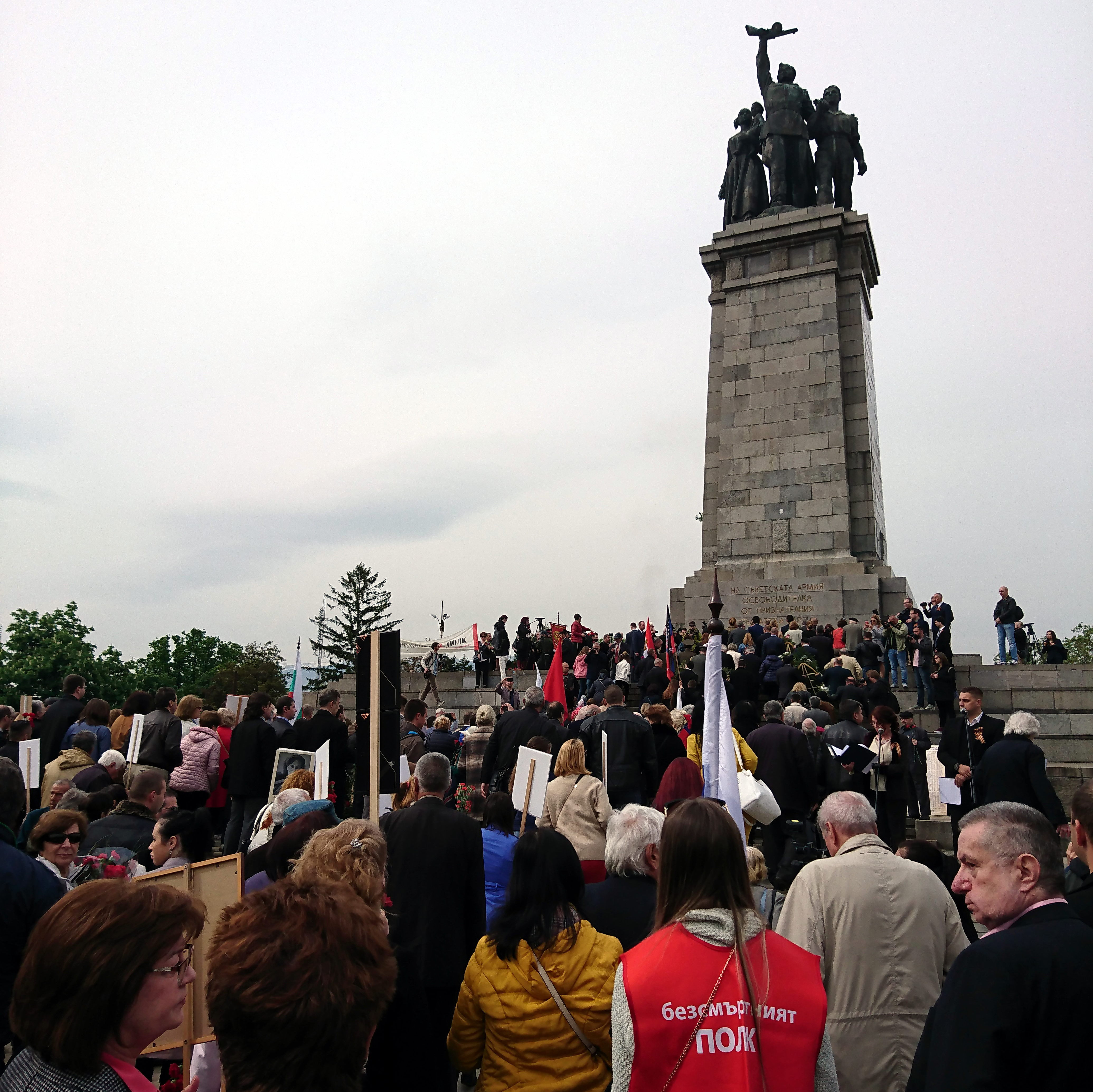 Безсмъртния полк 2019 пред Паметника на Съветската армия в София.